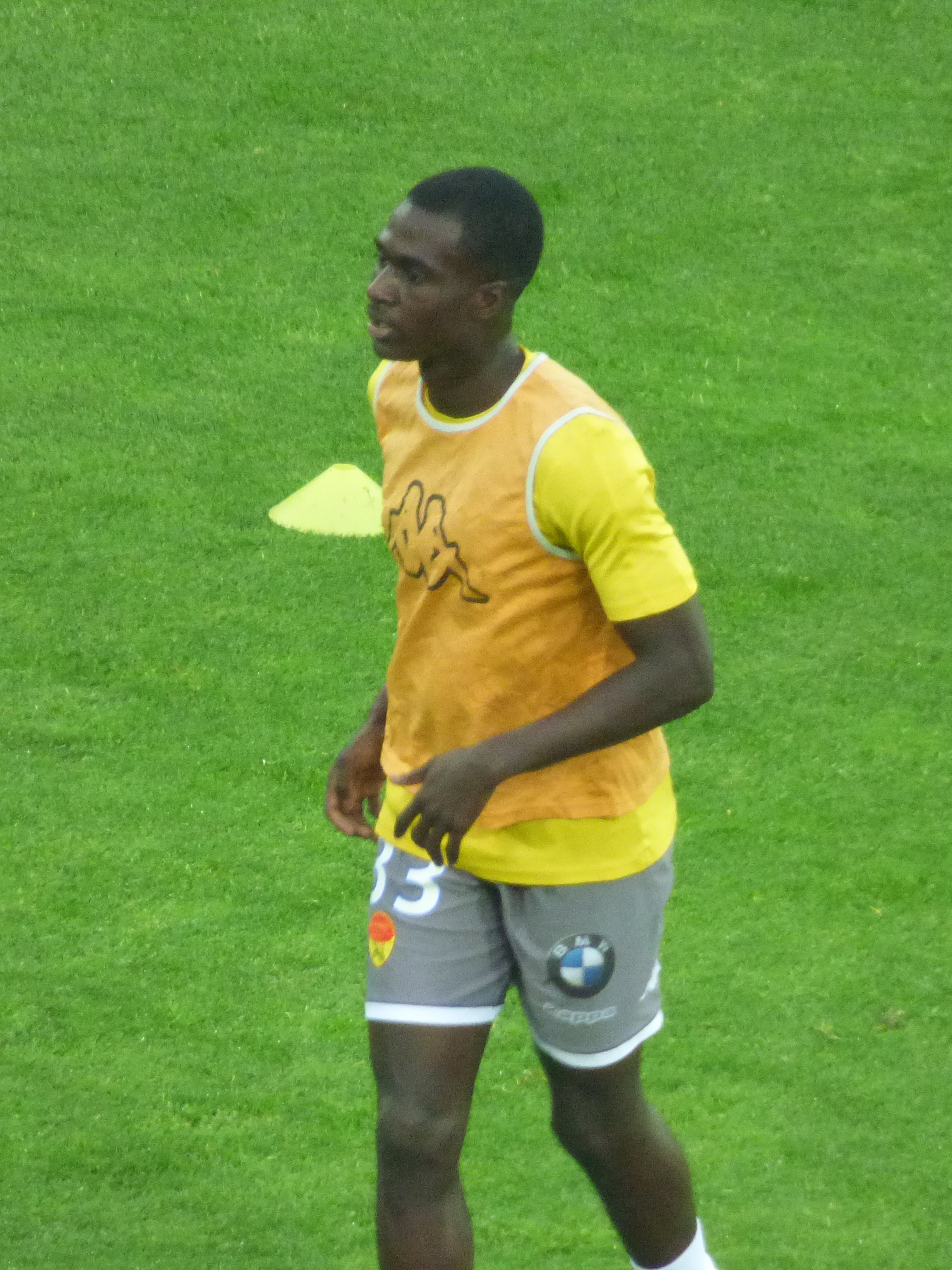 Abdoulkader Thiam avant le match RC Lens / US Orléans, le 17 mai 2019, comptant pour la 38ème journée du championnat de France de football de Ligue 2 2018-2019, au Stade Bollaert-Delelis.